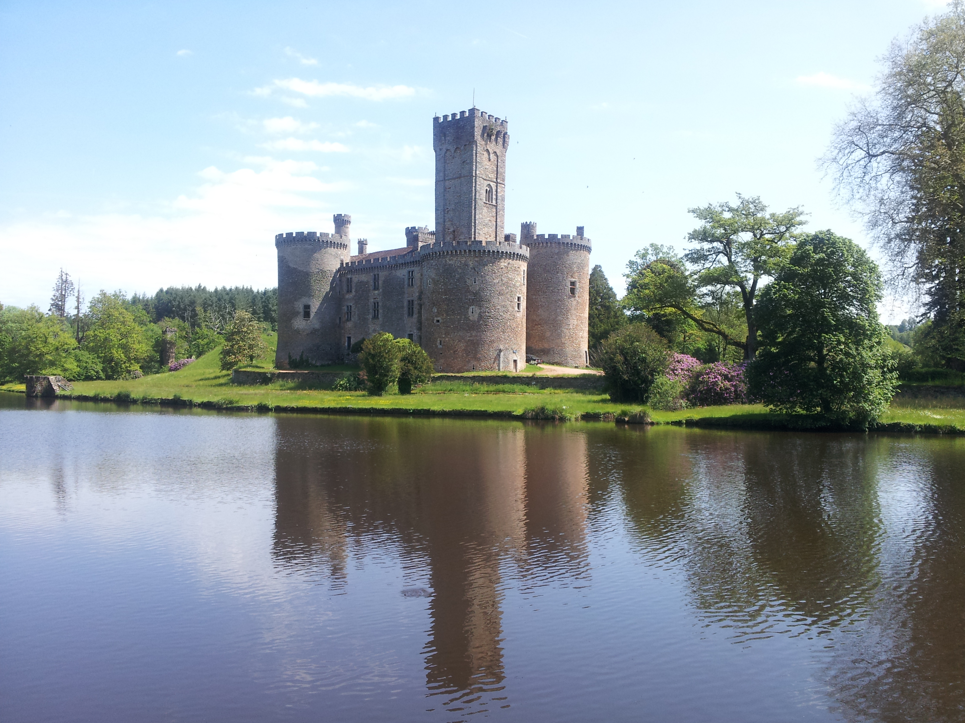 dordogne